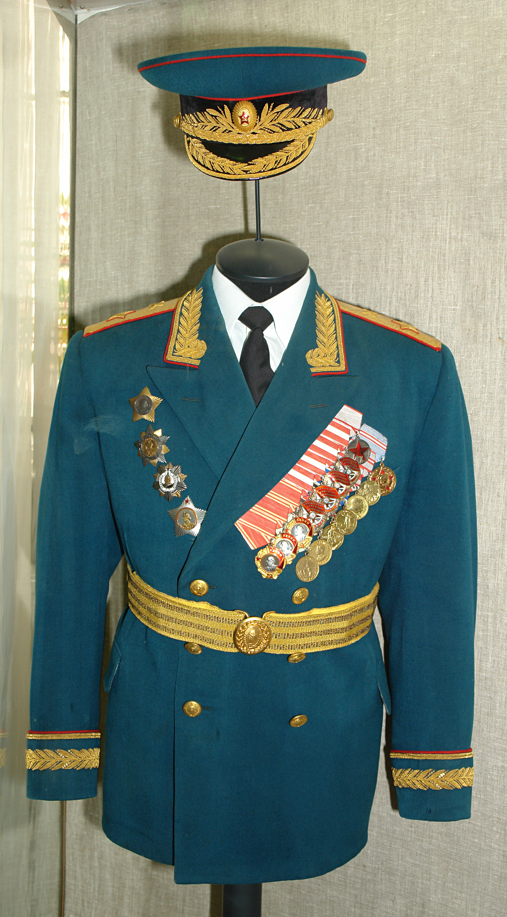 Форма маршала артиллерии СССР Одинцова Георгия Фёдровича (1900-1972) с наградами. Военно-исторический музей артиллерии, инженерных войск и войск связи, Санкт-Петербург. English translation of file name: Uniform of Artillery Marshal